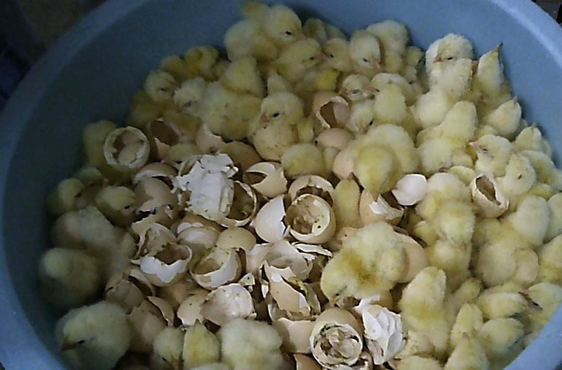 バケツに入れて圧死させる方法